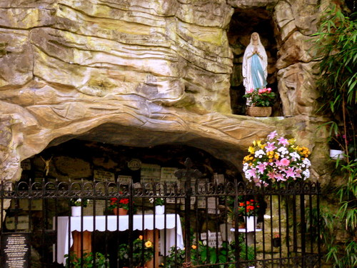 Lourdes-txiki-donostia